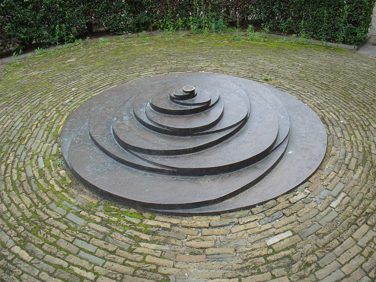 Phyllotaxis door Sjoerd Buisman - Korte Vest Gouda. Het kunstwerk is in oktober 2019 verwijderd en zou op de gemeentewerf staan.